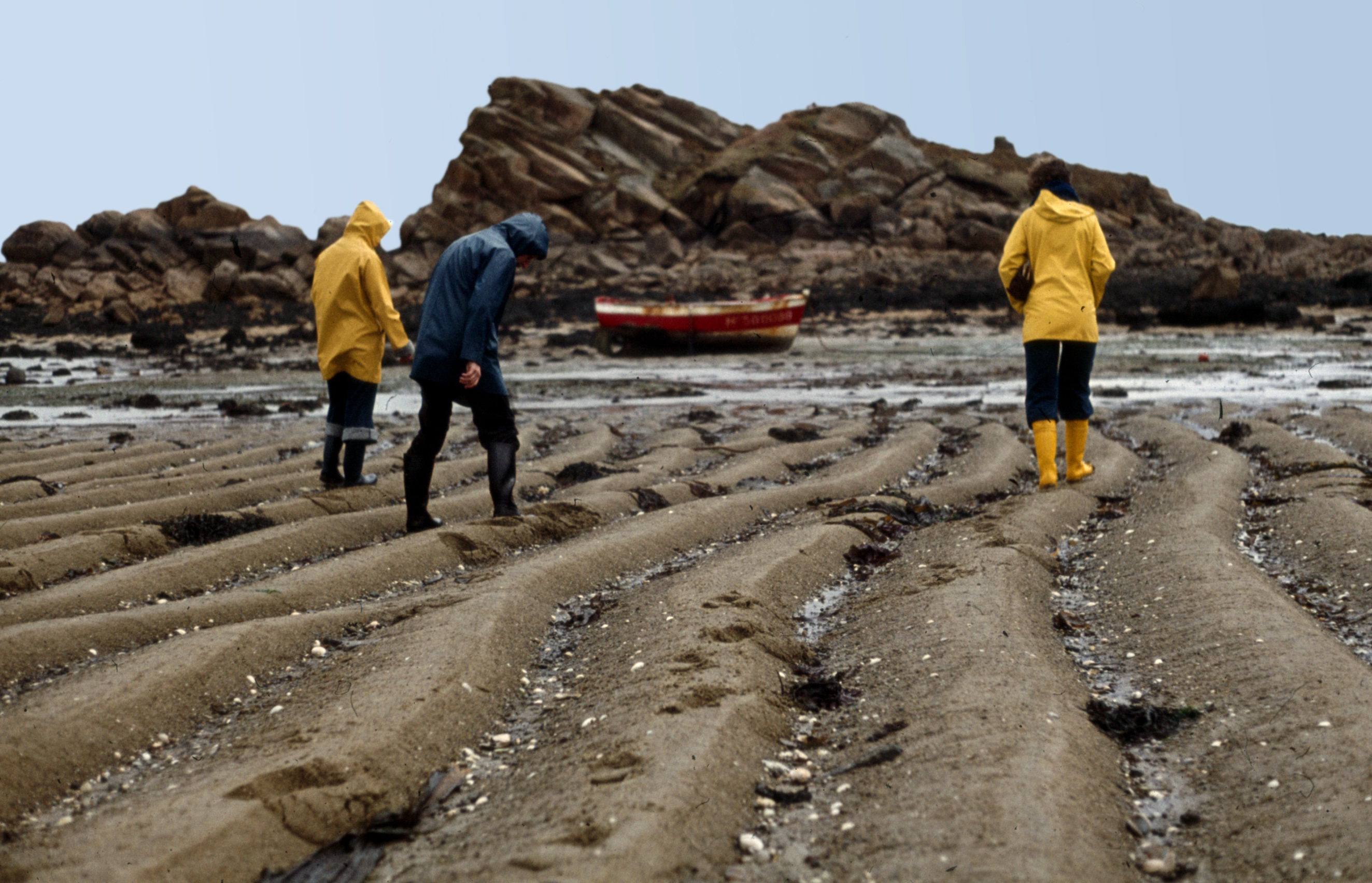 Carantec, Callot 1978